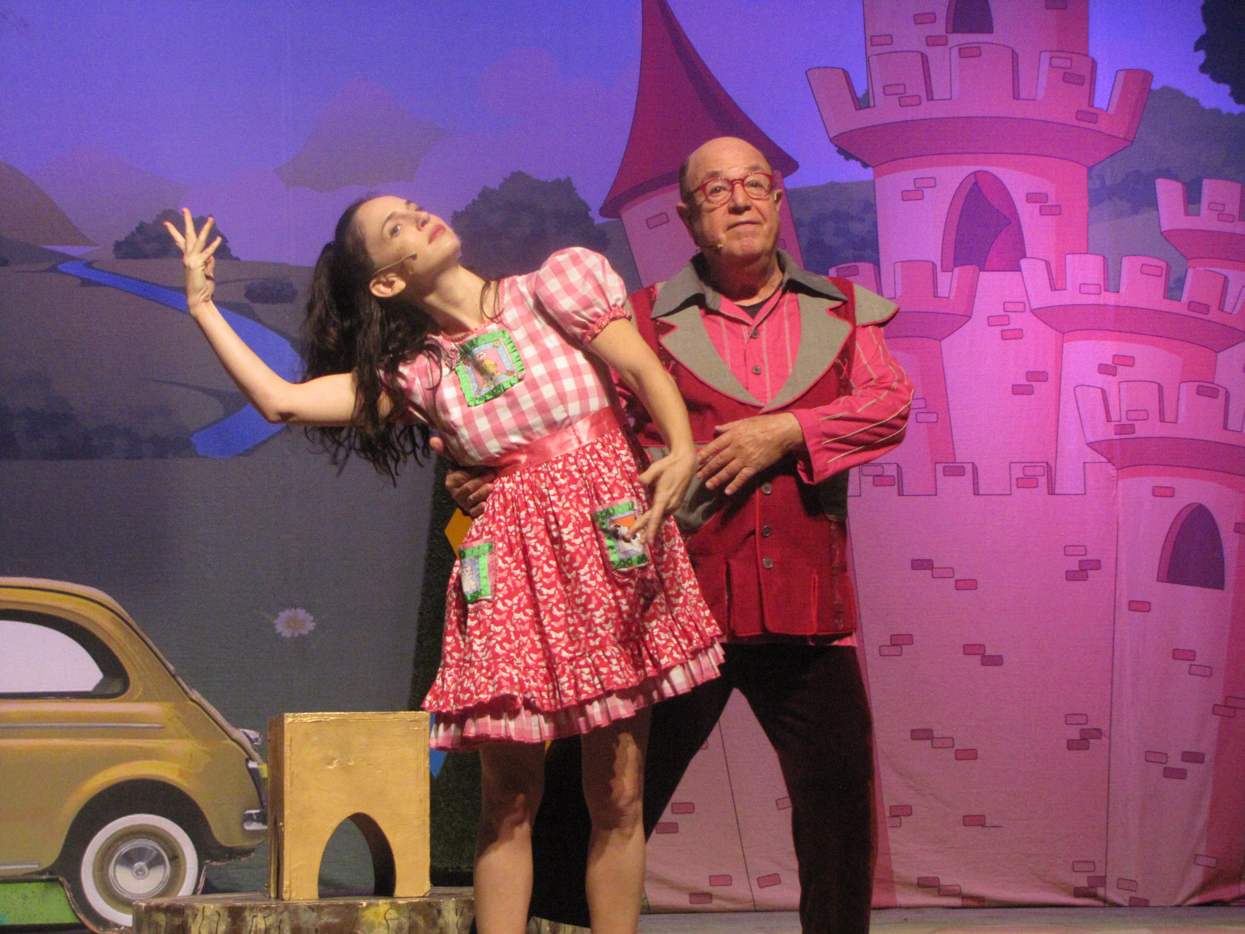 טוביה צפיר צילום שירה צפיר תיכון רוטברג